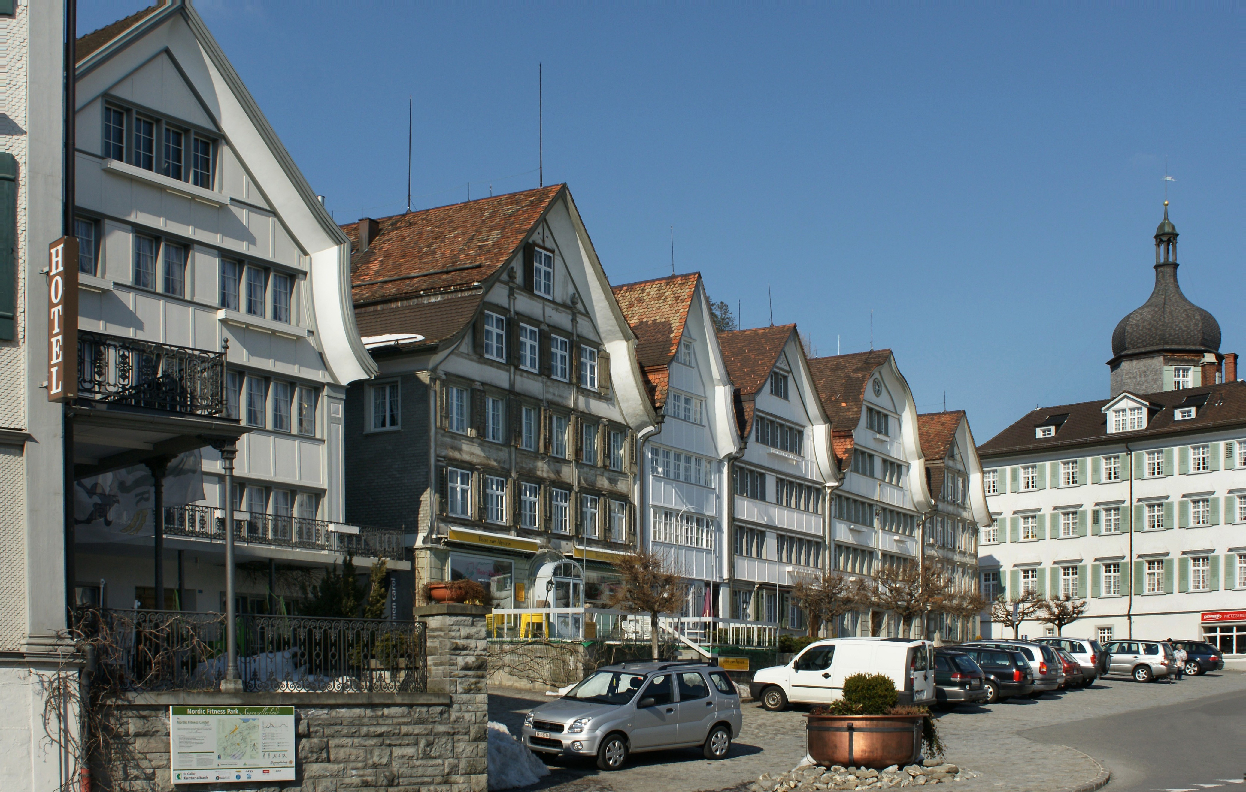 Häuserzeile am Dorfplatz in Gais. Rechts am Bildrand ein Teil vom Gasthaus Krone und links im Bild das Haus zum neuen Ochsen.